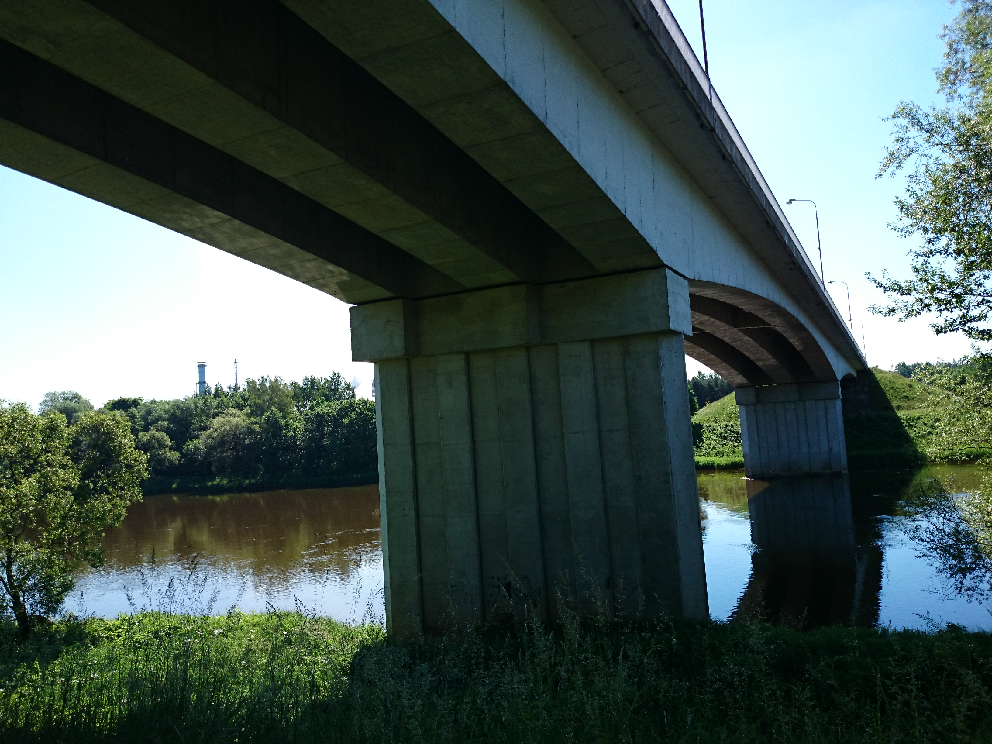 Taurosta bridge